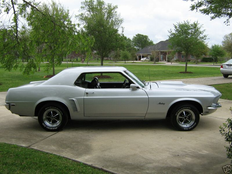 1969 Ford Mustang